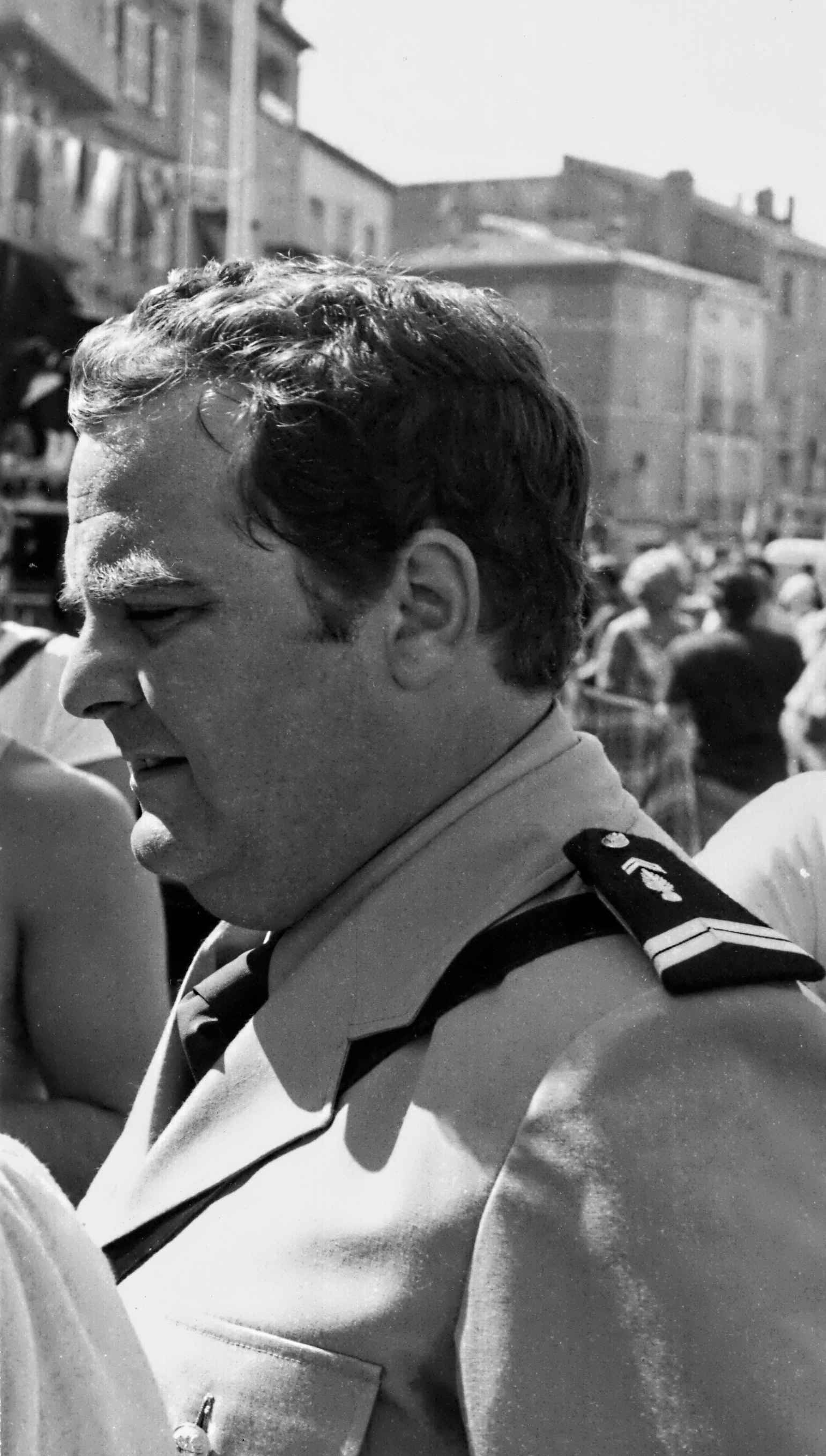 L'acteur Maurice Risch lors du tournage du film Le Gendarme et les Extra-terrestres en 1978, à Saint Tropez.